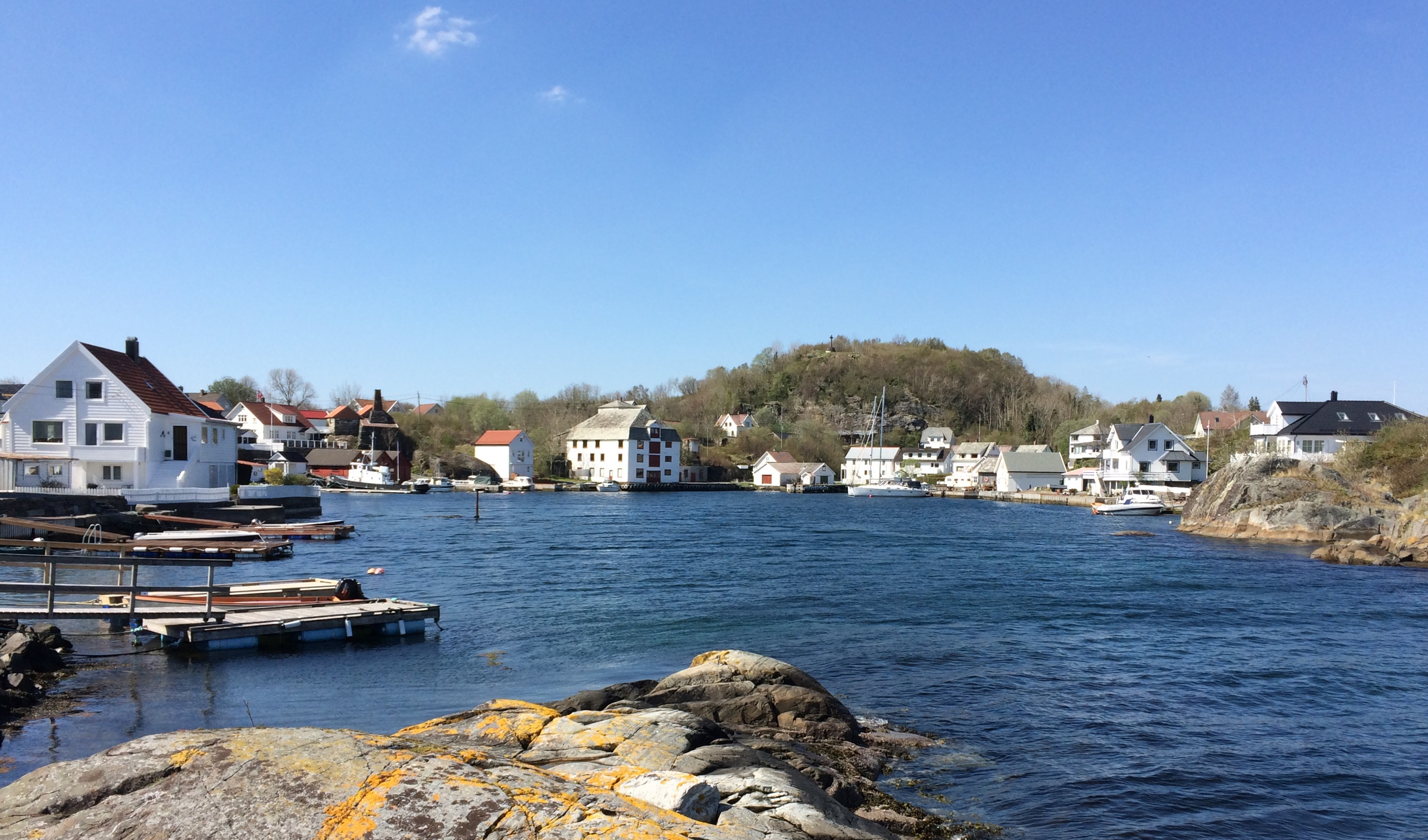 Mosterhamn